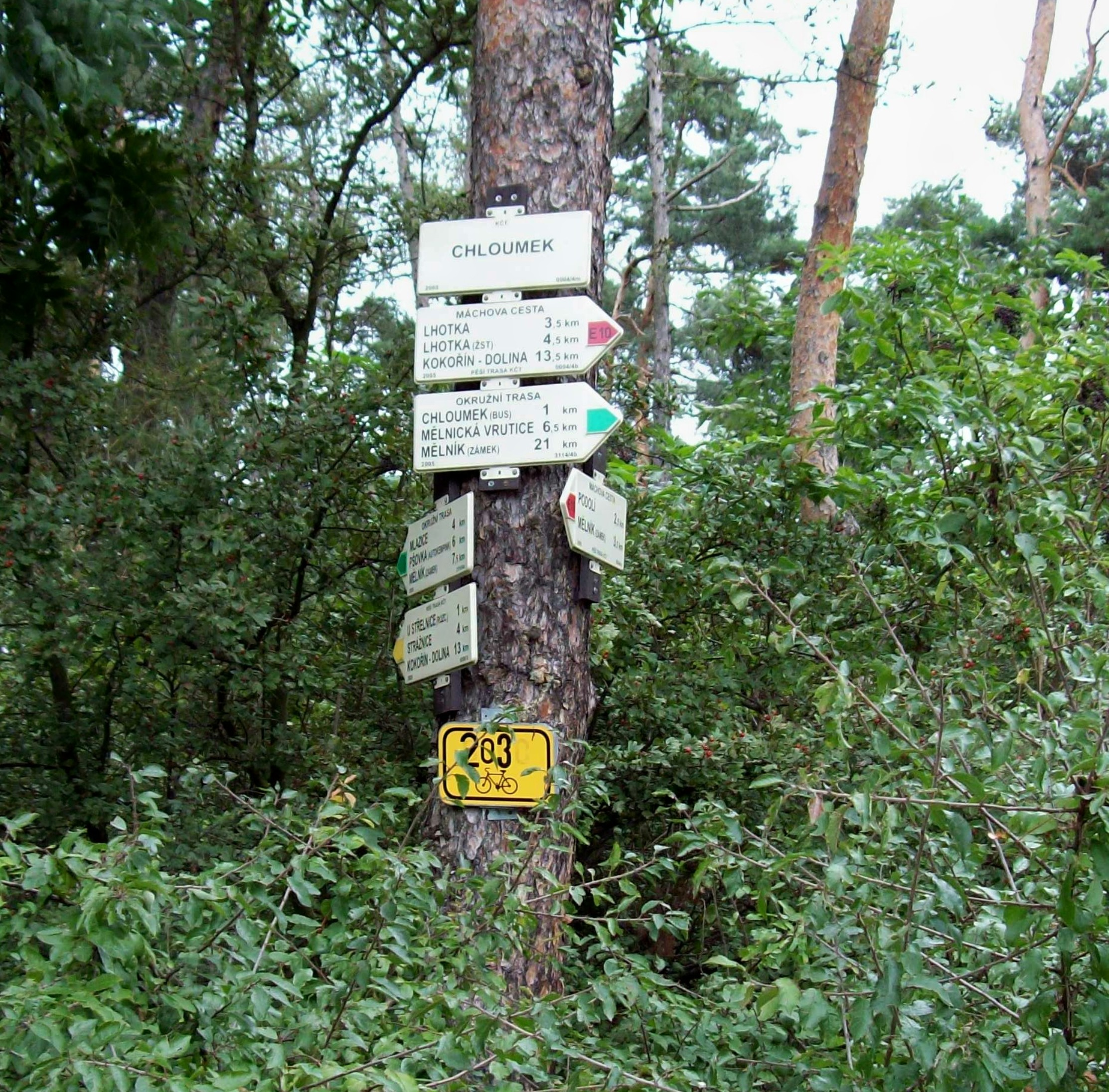 Značení turistických stezek při vstupu do borového lesa, spojnice ulic Lesní a Chloumecká na Chloumku v Mělníku.